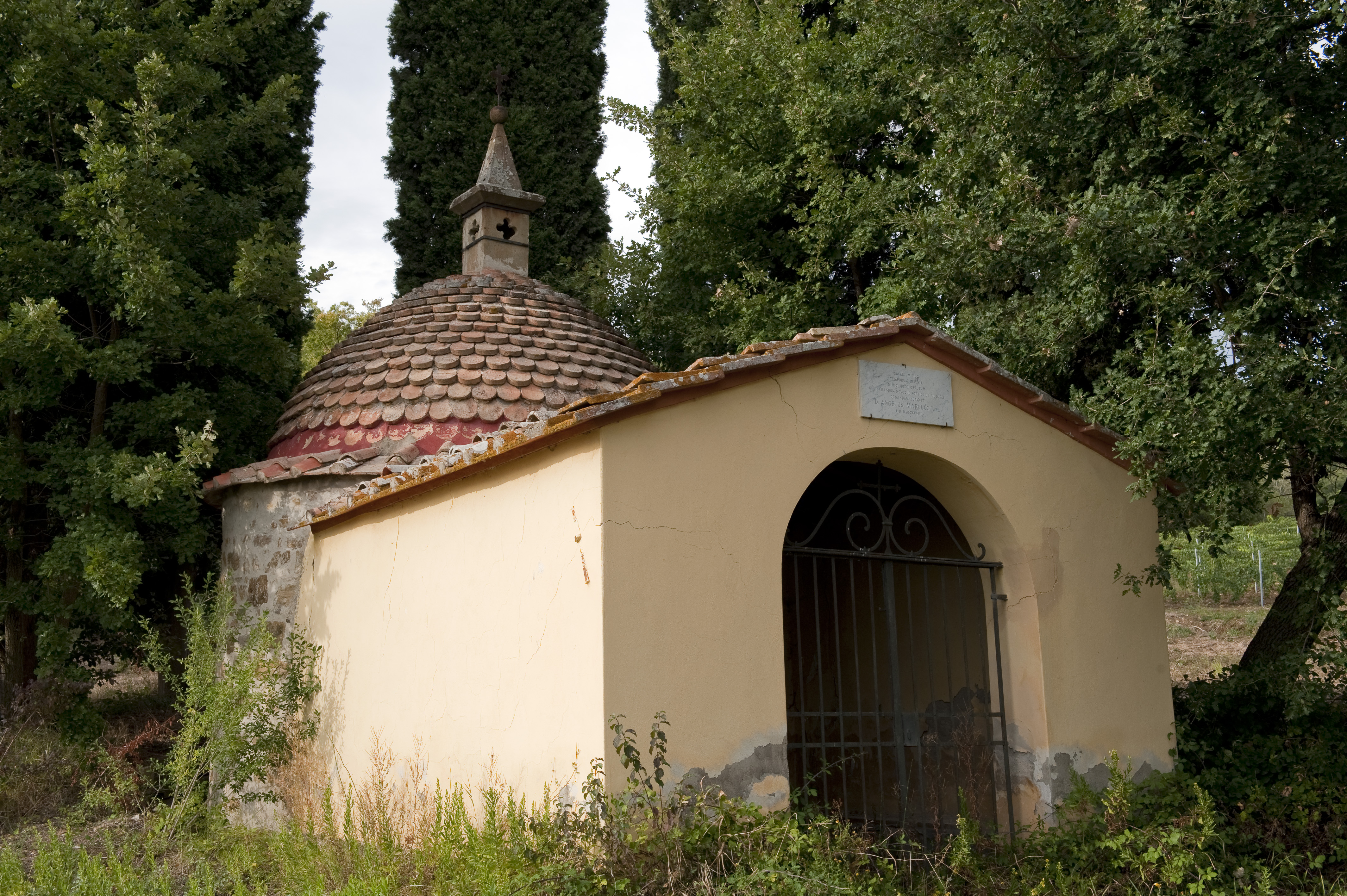 Cappellina dei Pesci, posta nei pressi dell'abbazia di Passignano